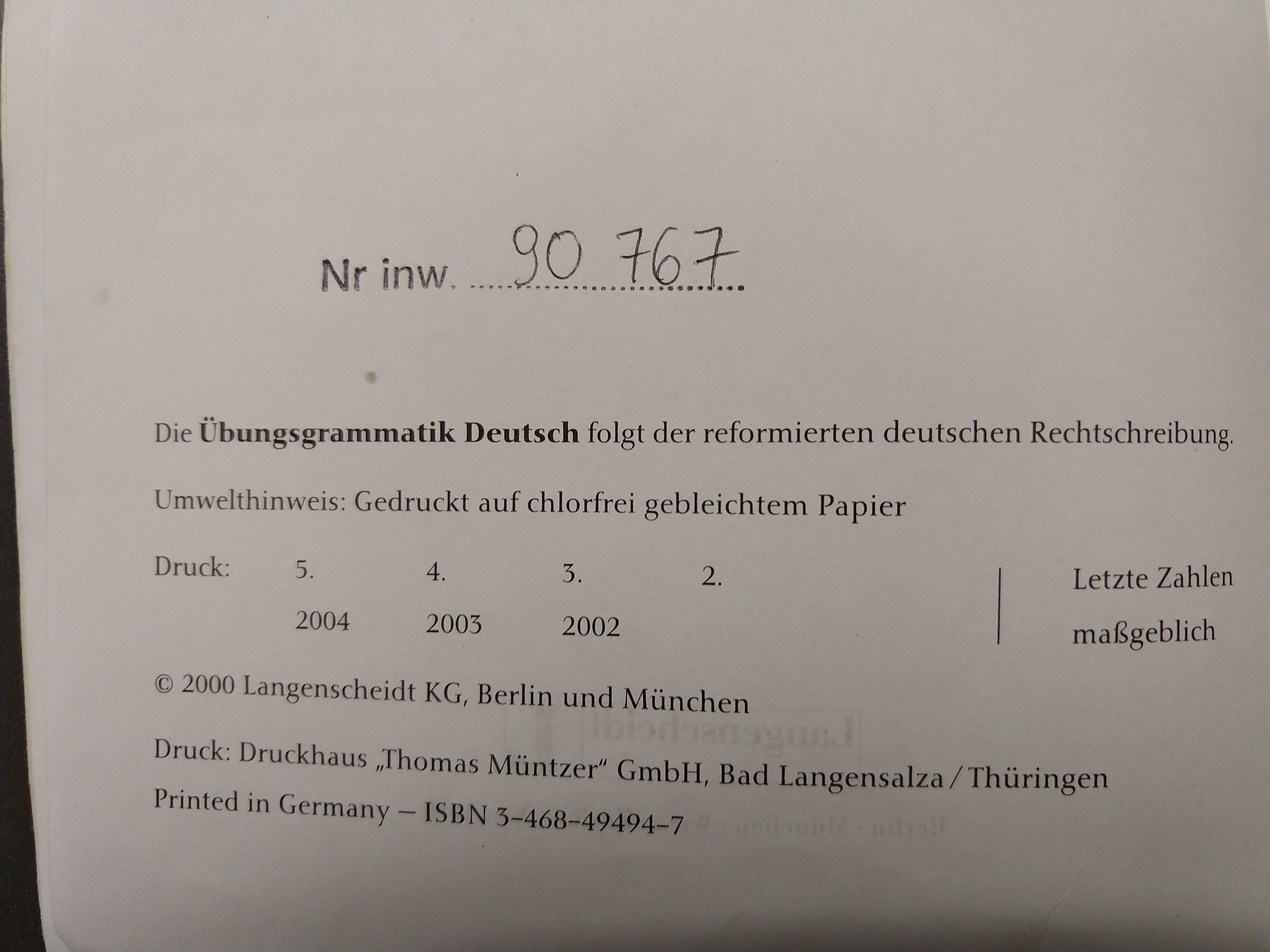 Strona redakcyjna książki wydanej w Niemczech z komentarzem dotyczącym printer's key